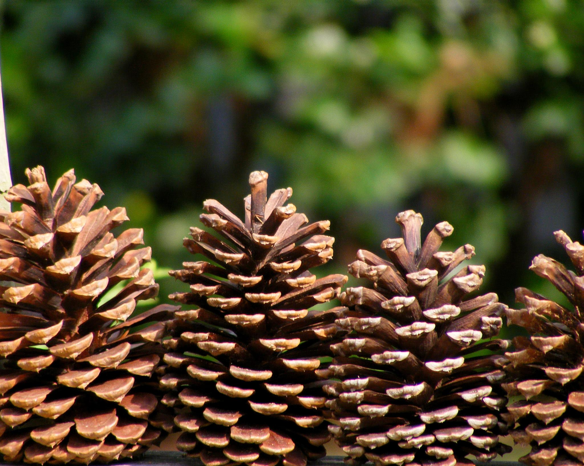 Pinus elliottii var. elliottii cones. Georgia, USA.